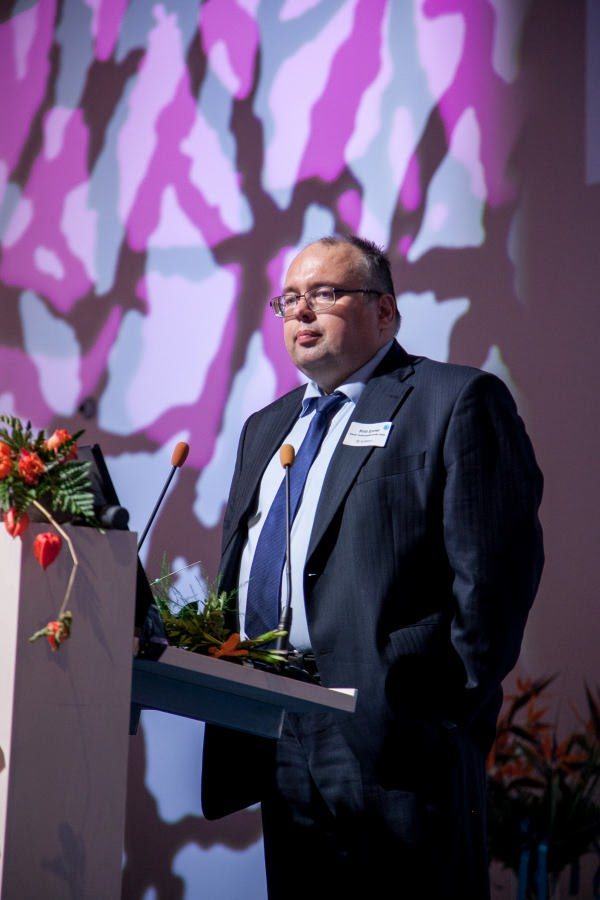 Eesti Teadusajakirjanike Seltsi esimees Priit Ennet 2016. aasta teaduskommunikatsiooni konverentsil.